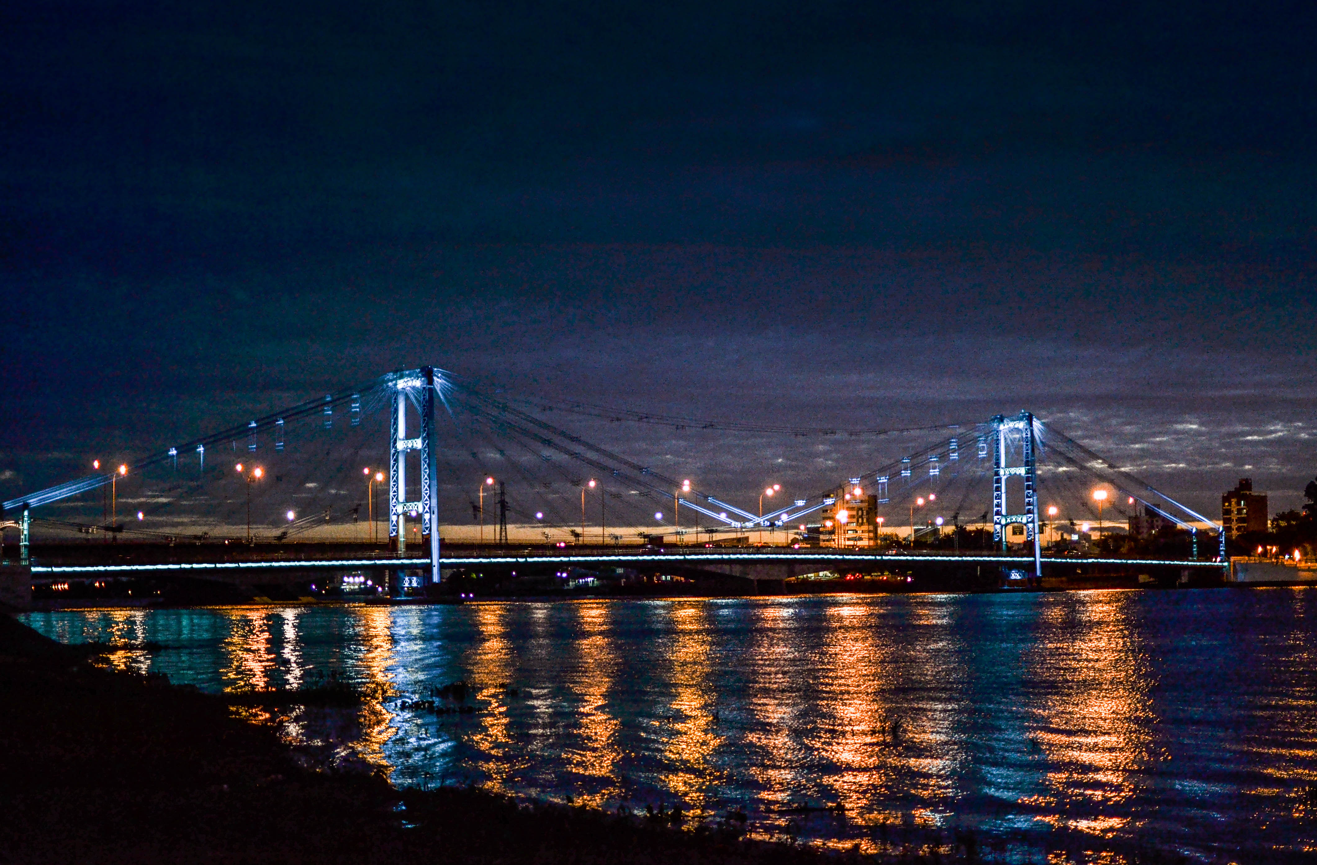 Puente colgante Santa Fe con la nueva iluminación (Mayo 2017) Vista desde costa este